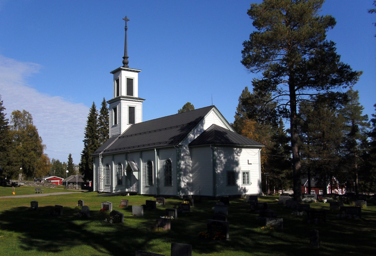 Korpilombolo kyrka